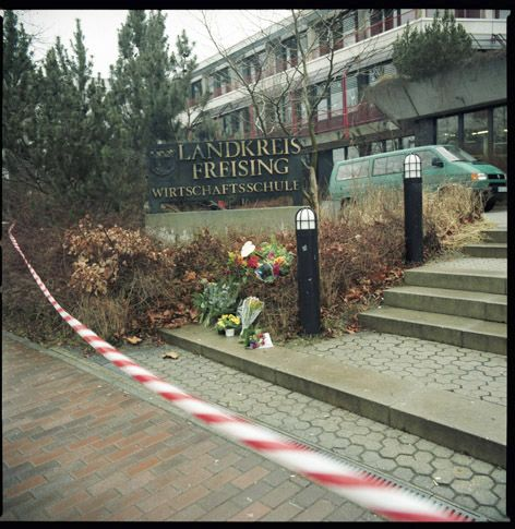 Der Amoklauf von Eching und Freising. Die Wirtschaftsschule in Freising (Bayern) am Tag der Tat von der Wippenhauserstraße aus gesehen